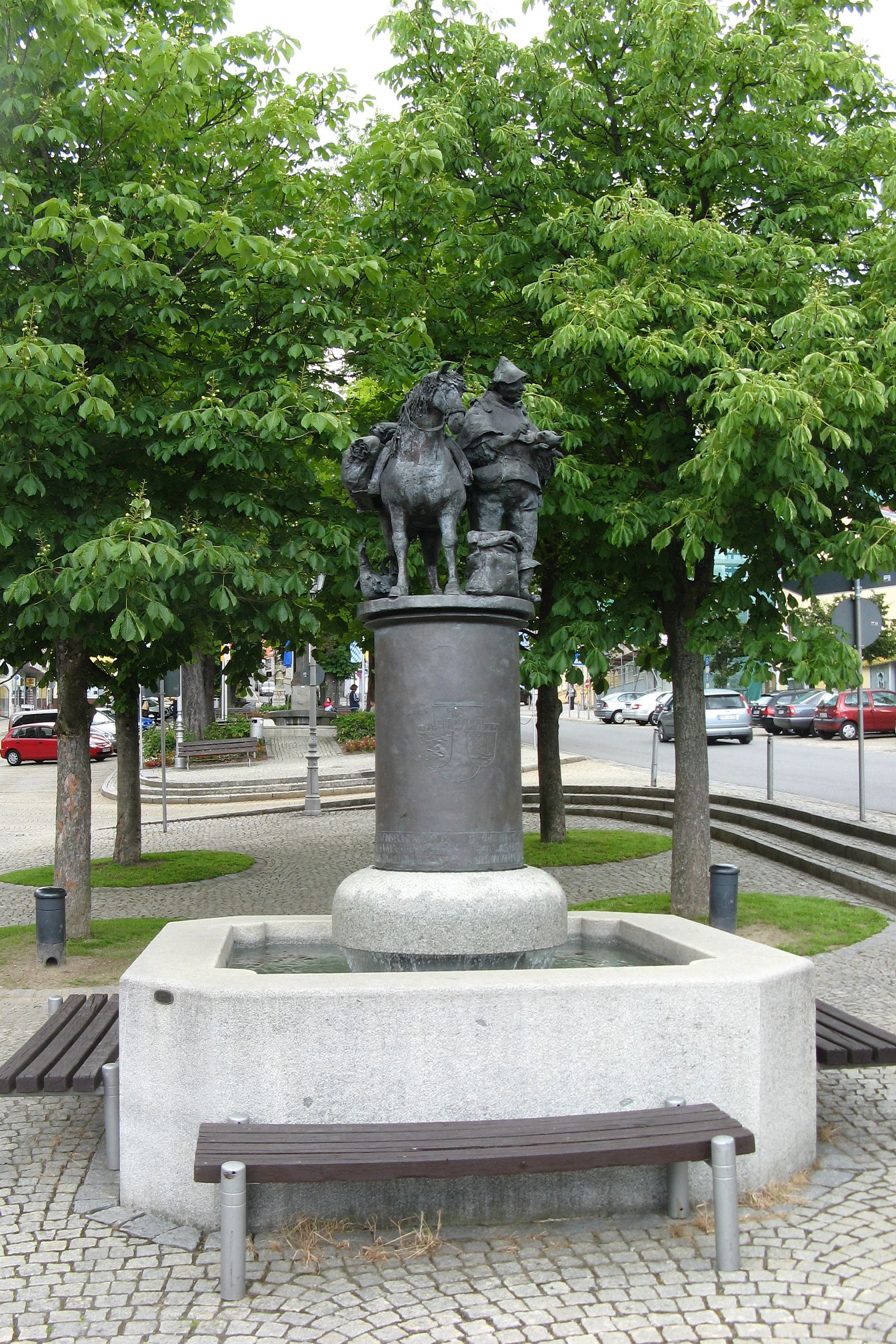 Brunnen zur Erinnerung an den Salzhandel (Goldener Steig) in Grafenau, Niederbayern